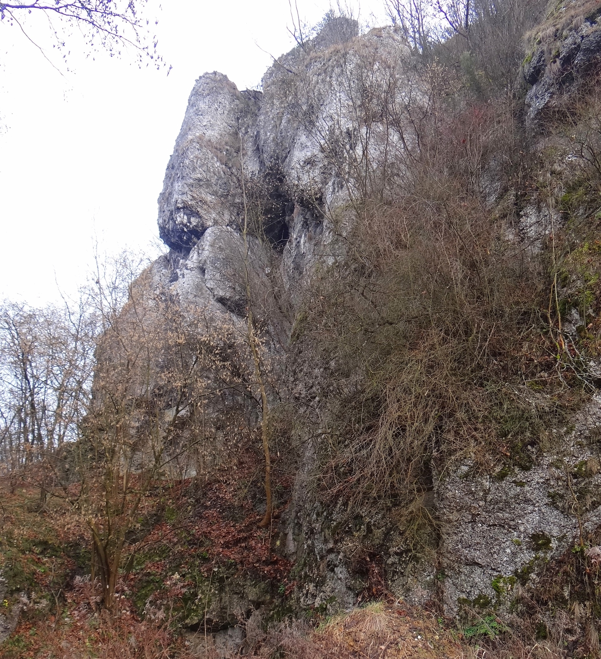 ła w Zimnym Dole